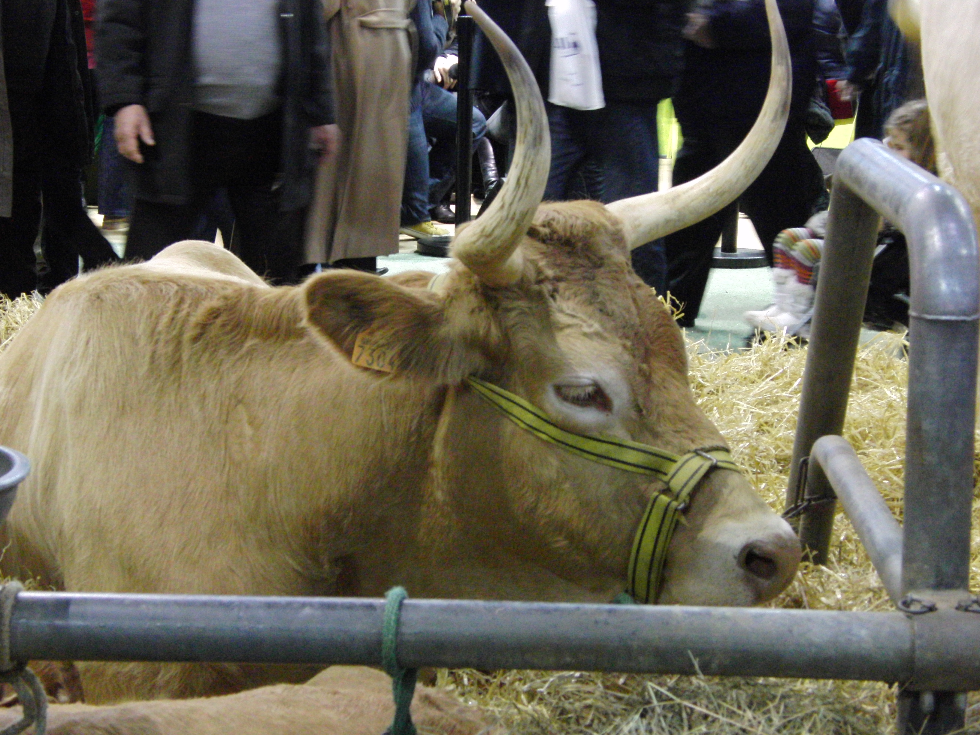 Vache Béarnaise - Salon international de l'agriculture 2013, Paris, France